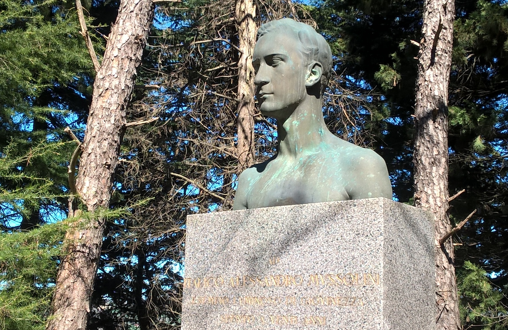 Busto di Sandro Italico Mussolini presso il cimitero di Paderno di Mercato Saraceno (FC)